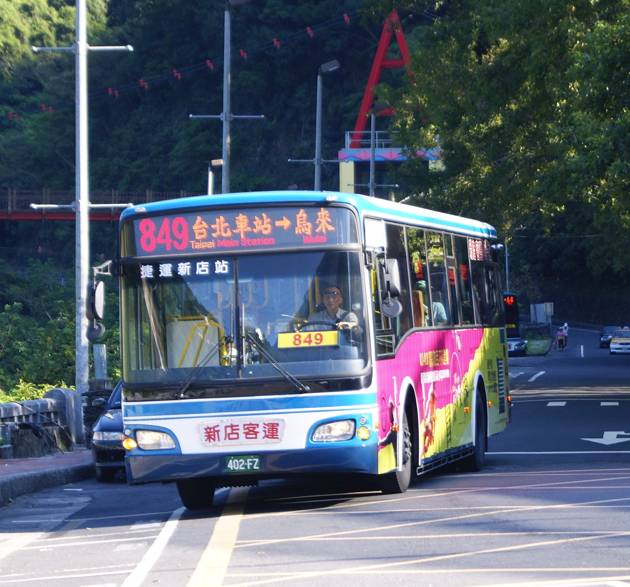 新店客運大客車402-FZ行駛新北市市區公車849路